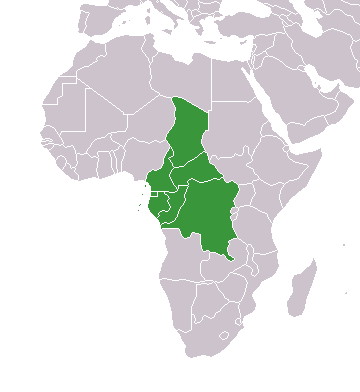 Karte Mitgliedstaaten der Union des Fédérations du Football d'Afrique Centrale